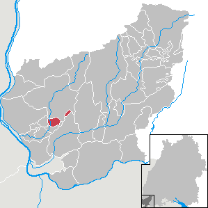 Wittlingen, Landkreis Lörrach, Baden-Württemberg